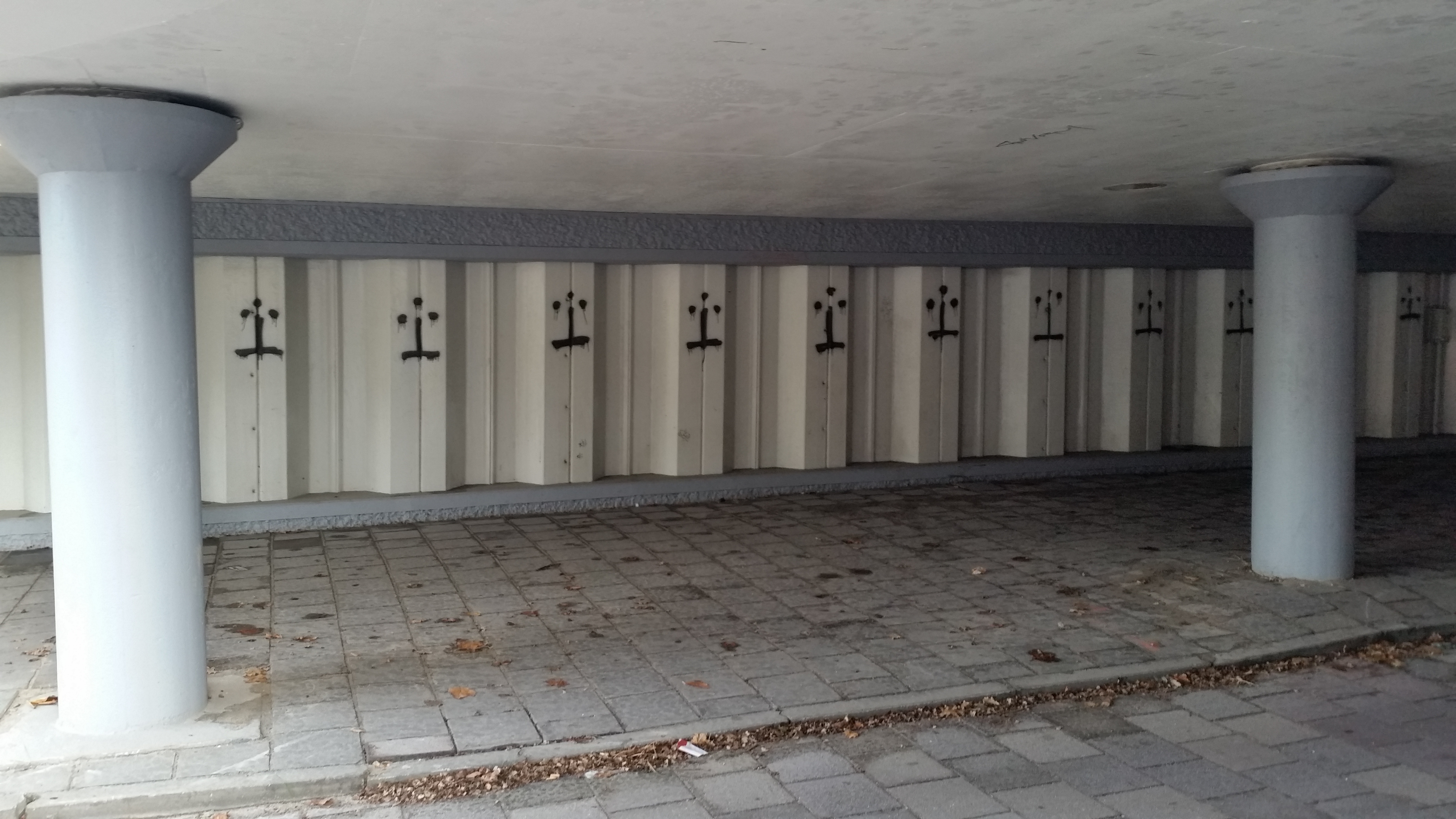 Brug 857 van Dirk Sterenberg in november 2019 tijdens werkzaamheden aan de Rechtbank van Amsterdam